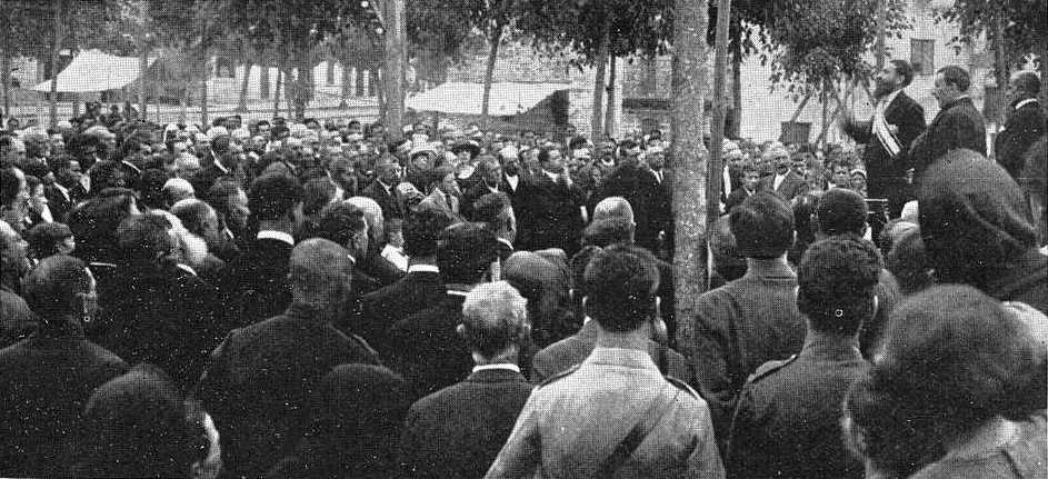 Alejandro Mon-Landa Landa no acto de imposición da Gran Cruz de Sabela a Católica, fotografía en Vida Gallega 1922